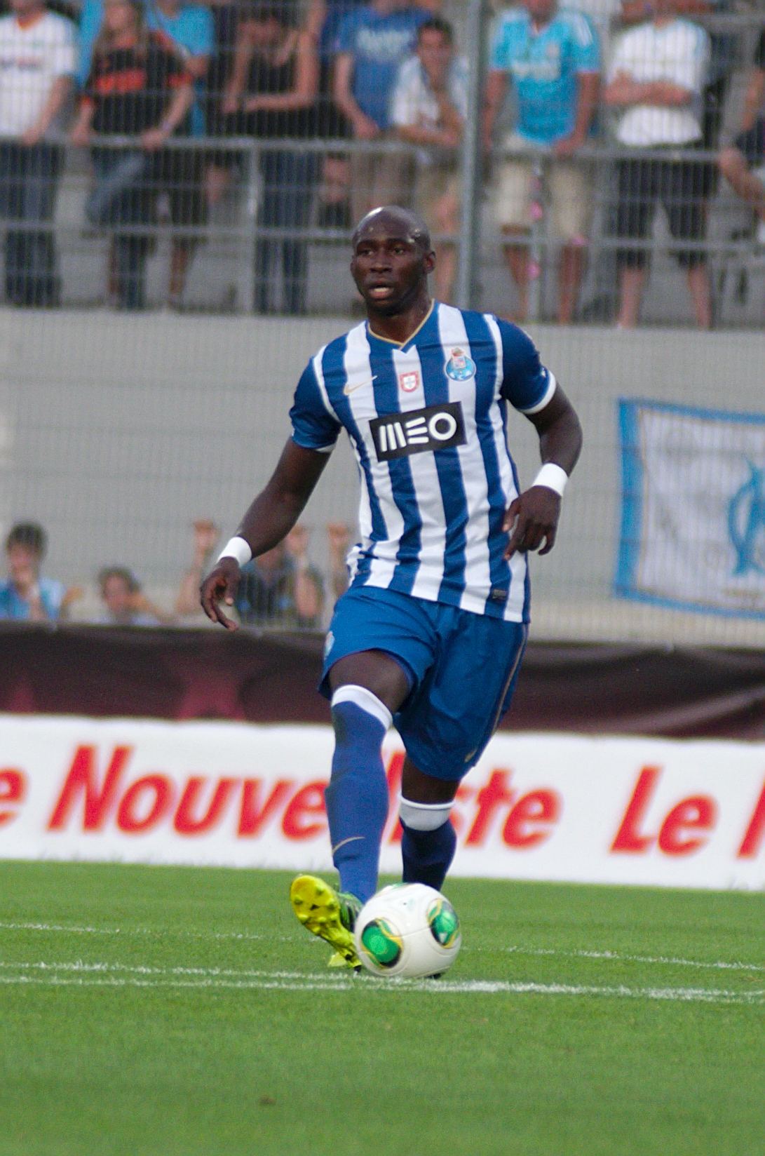 Valais Cup 2013 - OM-FC Porto - 20130713 - Eliaquim Mangala